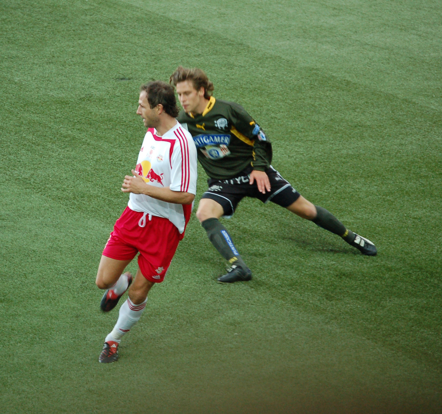 Roland Kirchler (Red Bull Salzburg vs. SK Sturm Graz in EM-Stadion Wals-Siezenheim)